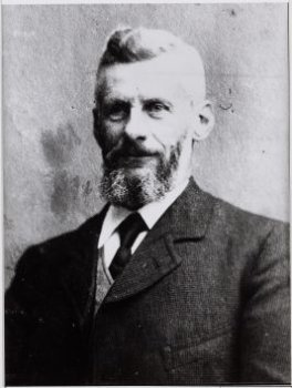 Leonard Antonij Springer, tuinarchitect